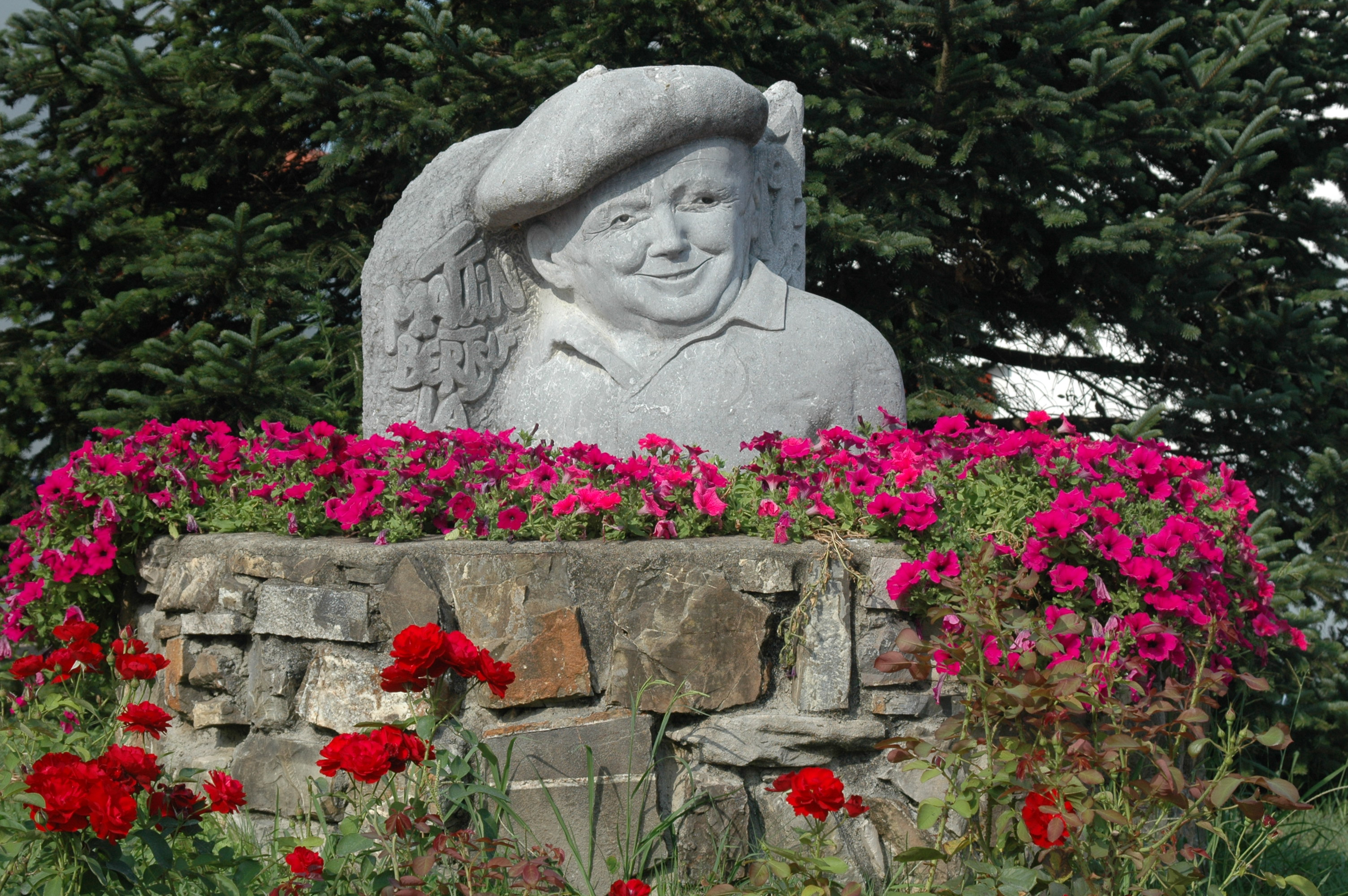 Ahetze, statue de Mattin Treku ,finie en 1982. Photo prise le 23/07/06 par Harrieta171